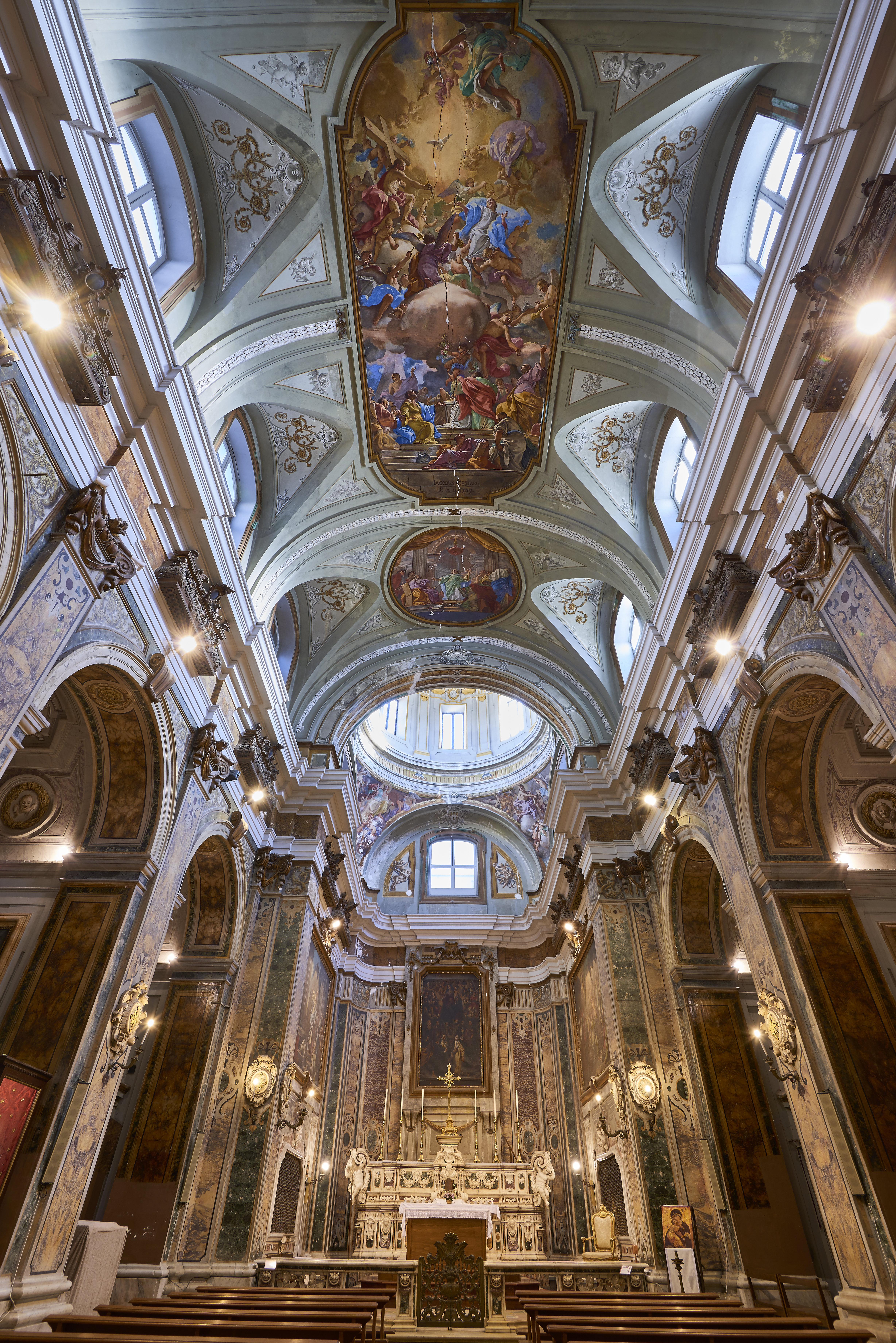 Interno Chiesa - Affreschi nella volta di Jacopo Cestaro del 1759